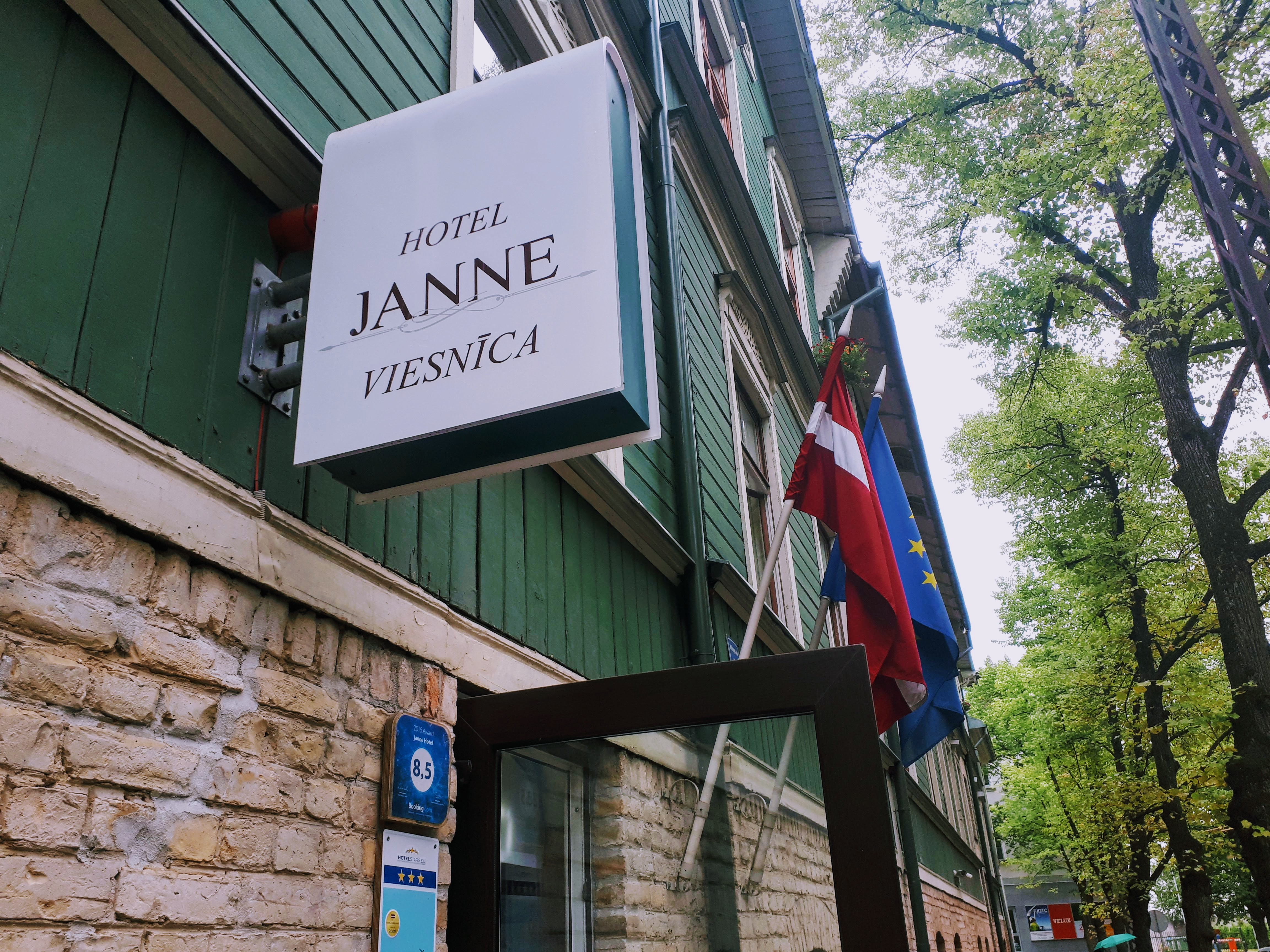 Hotel Janne ieeja